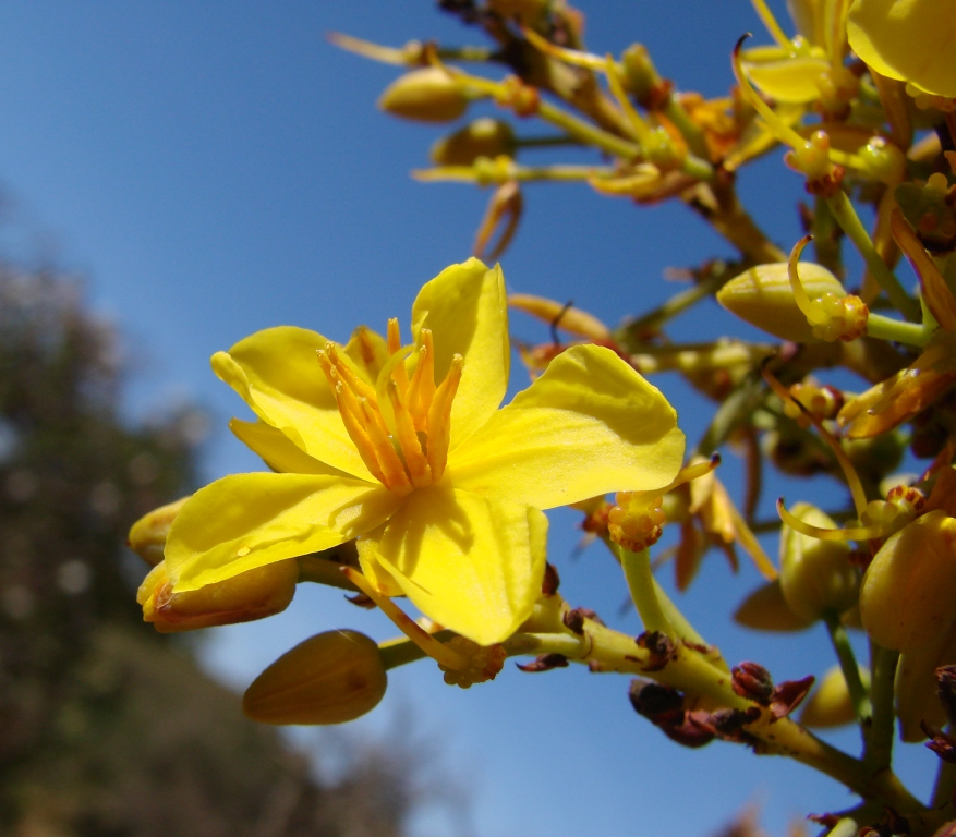 Ouratea hexasperma (A. St.-Hil.) Baill. - OCHNACEAE - Parque Olhos D'Água - Brasília - Distrito Federal - Brasil.